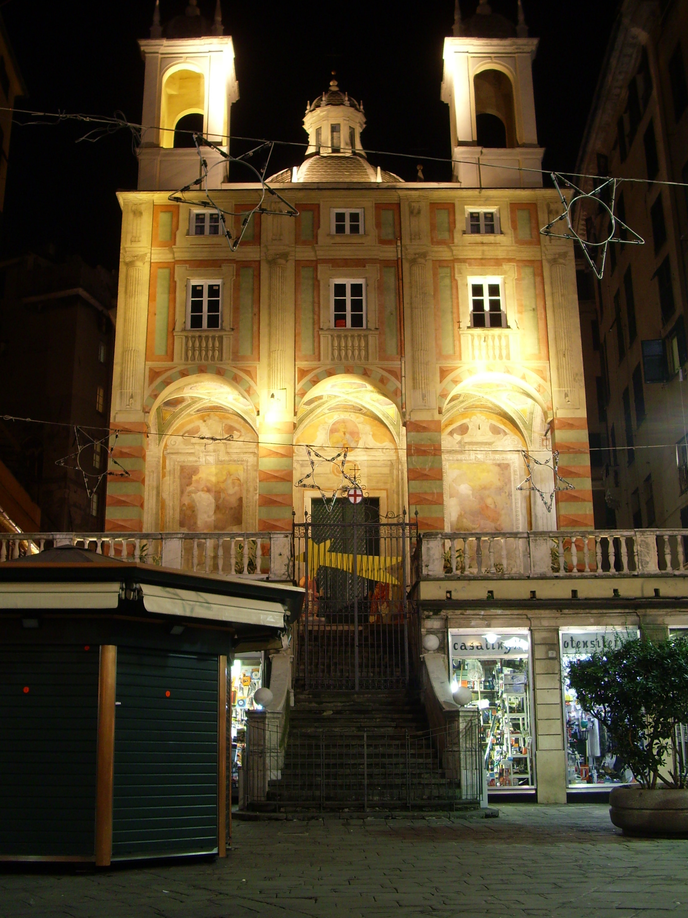 Chiesa di San Pietro in Banchi, a Genova. Realizzata nel XVI secolo sul luogo dove due secoli prima sorgeva la chiesa di San Pietro della Porta, distrutta da un incendio.